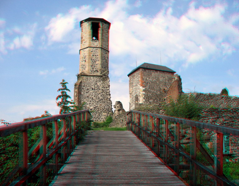 3D - Kisnána - Hungary - Europe